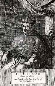 Gegenraformator Kardinal Karl Eitel friedrich von Hohenzollern Sonstiges: ...